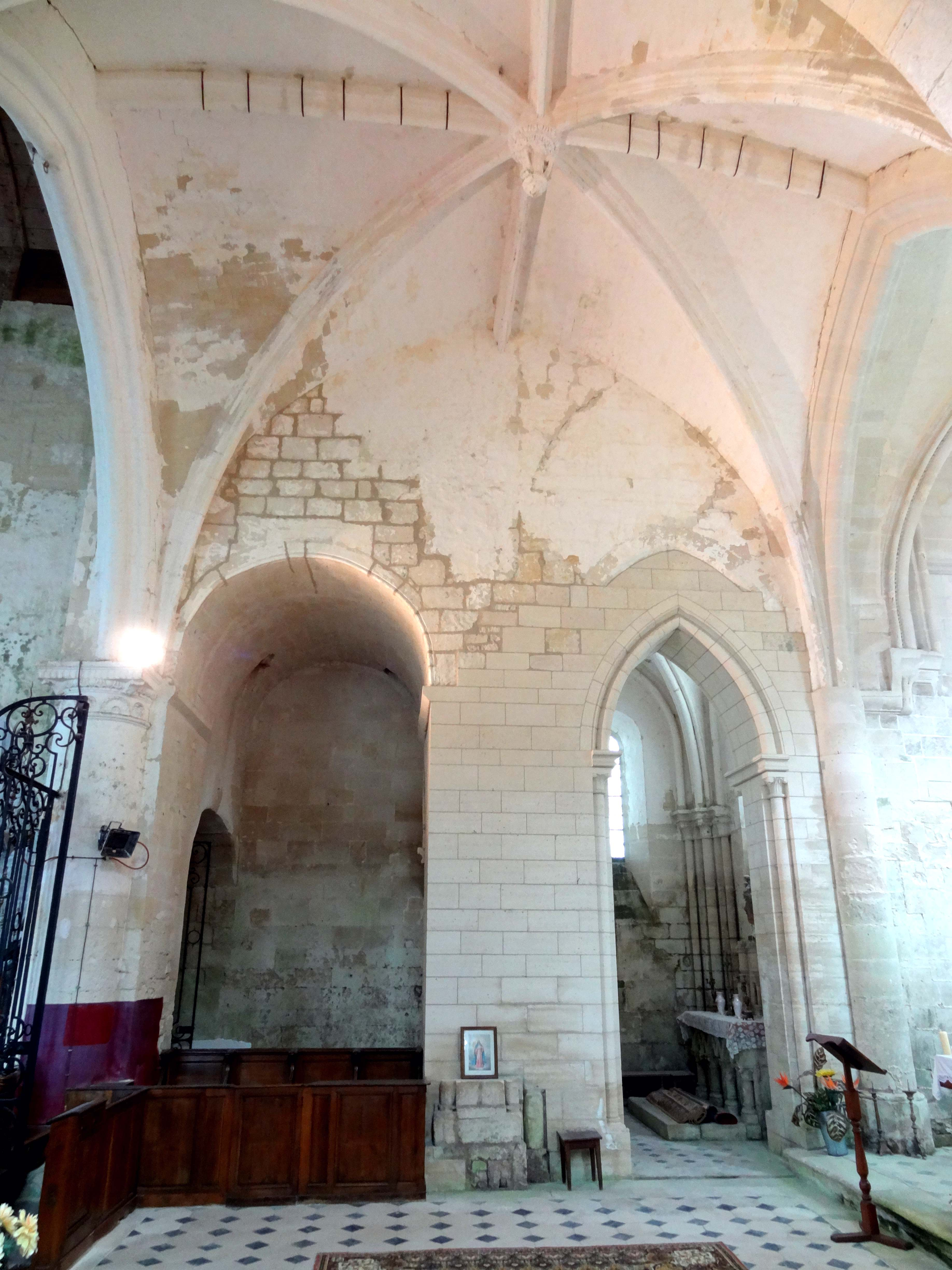 Intérieur de l'église - voir titre.